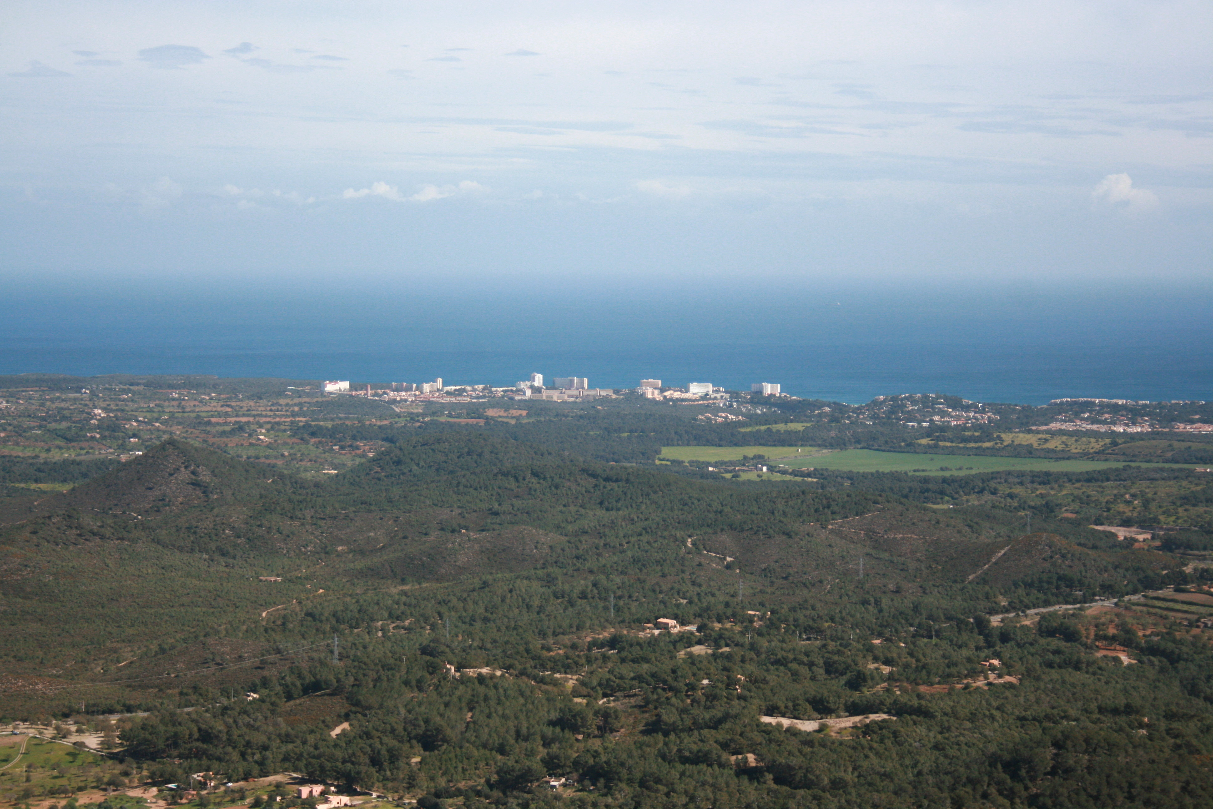 Cales de Mallorca of Manacor viewed from Puig de Sant Salvador in Felanitx